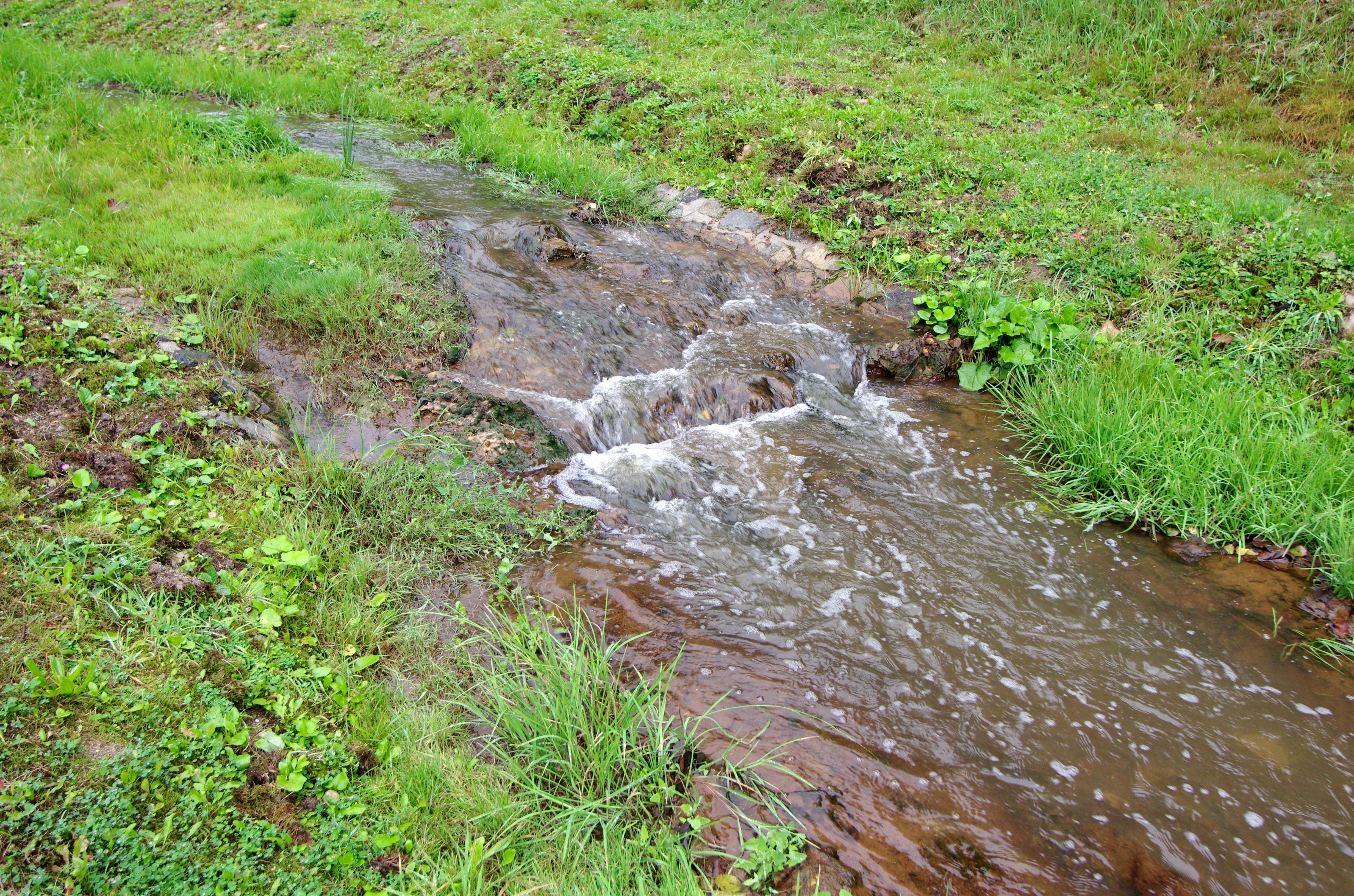 Lomnický potok (přítok Svatavy), v Lomnici, okres Sokolov